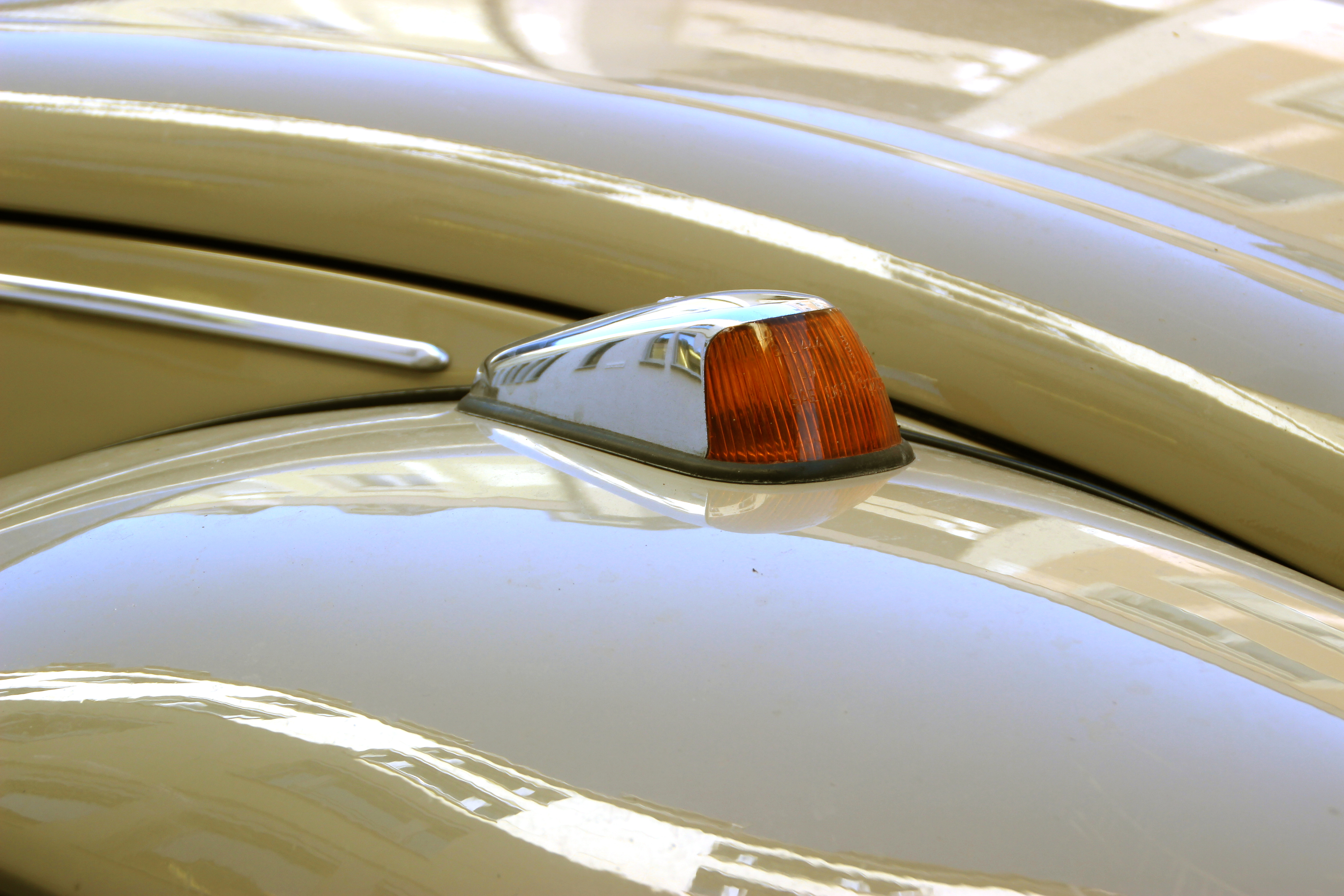 Volkswagen Käfer, Typ 1300 in Kempten